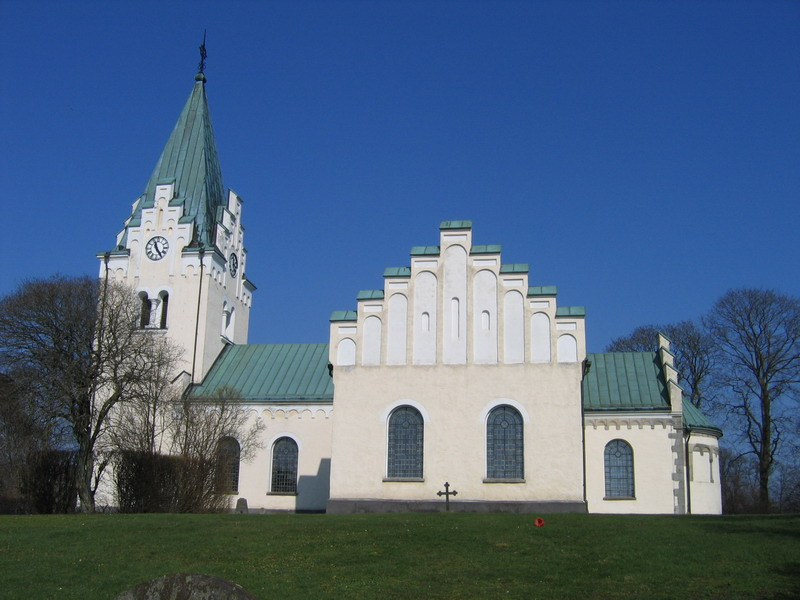 Church of Höör,Sweden